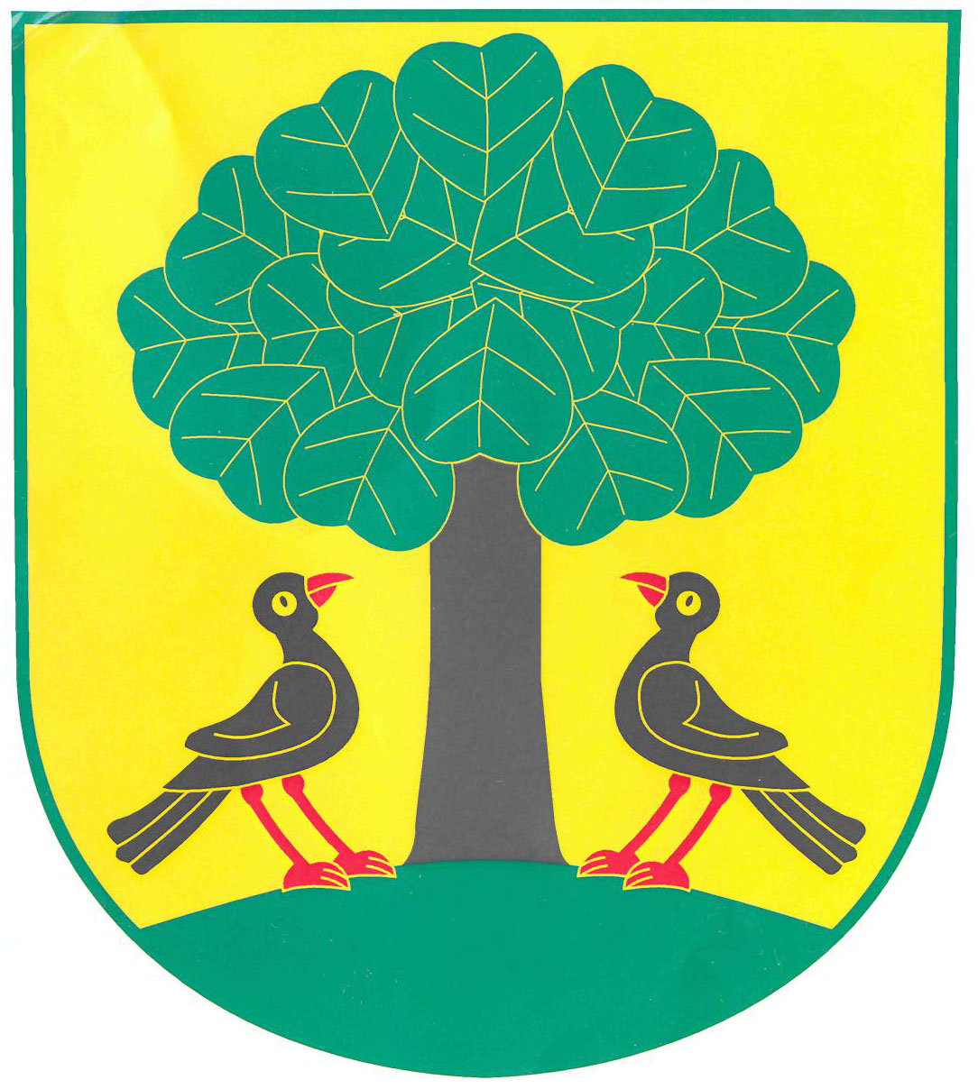 Znak obce Podůlší